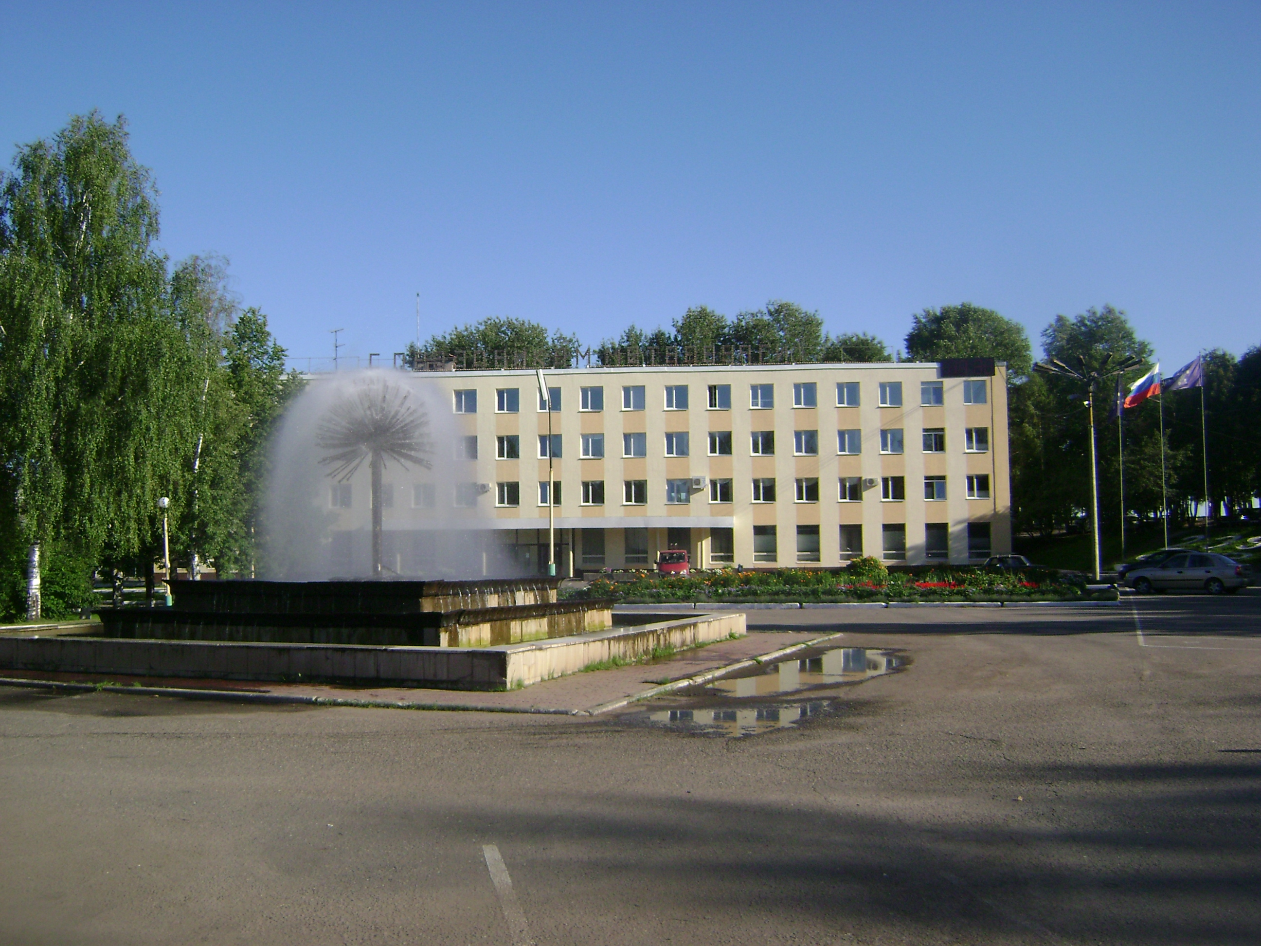 Здание заводоуправления ОМЗ и центральная площадь Омутнинска